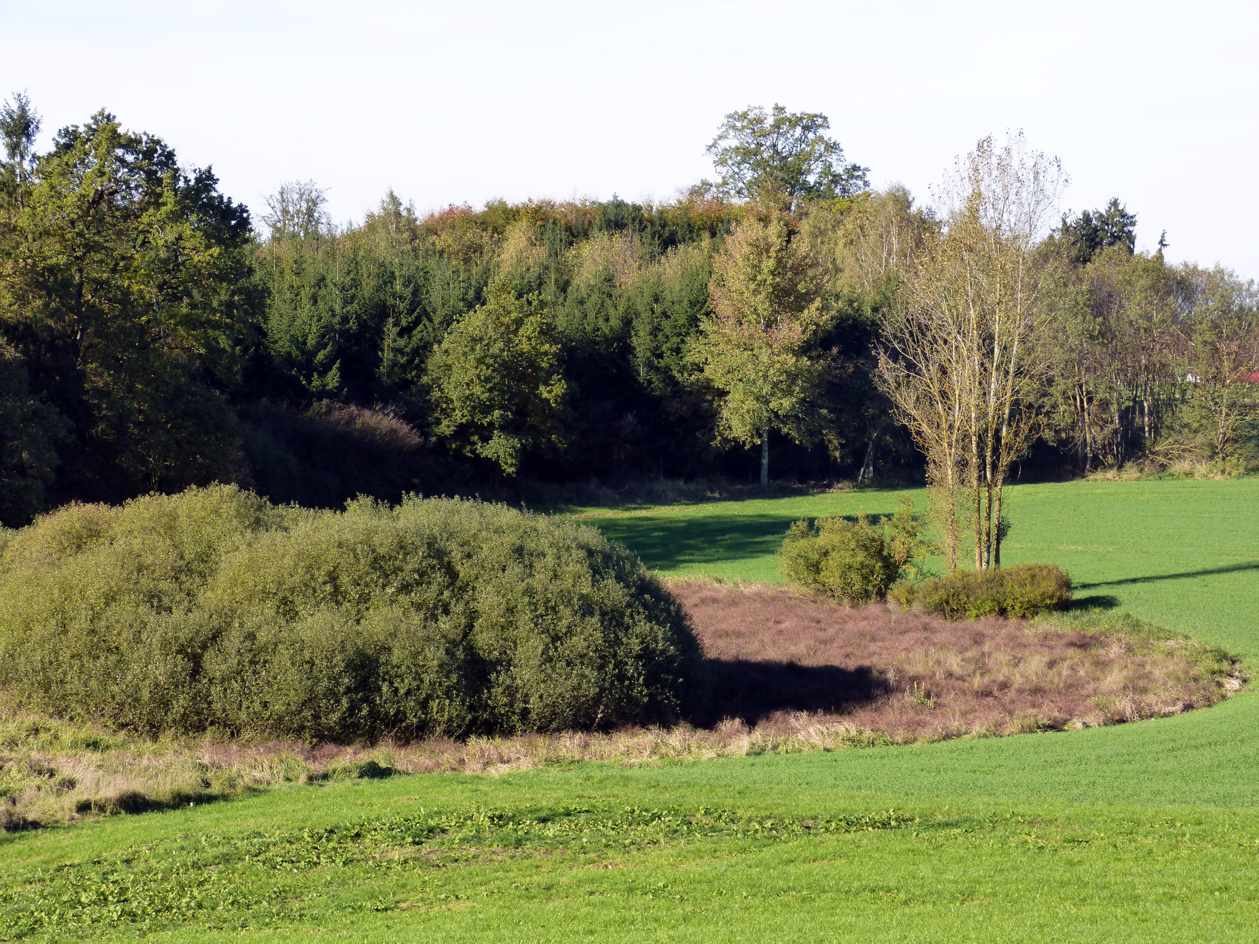 Wörthsee, Toteisloch im Ortsteil Etterschlag.